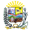 Escudo del municipio Pampanito, estado Trujillo, Venezuela